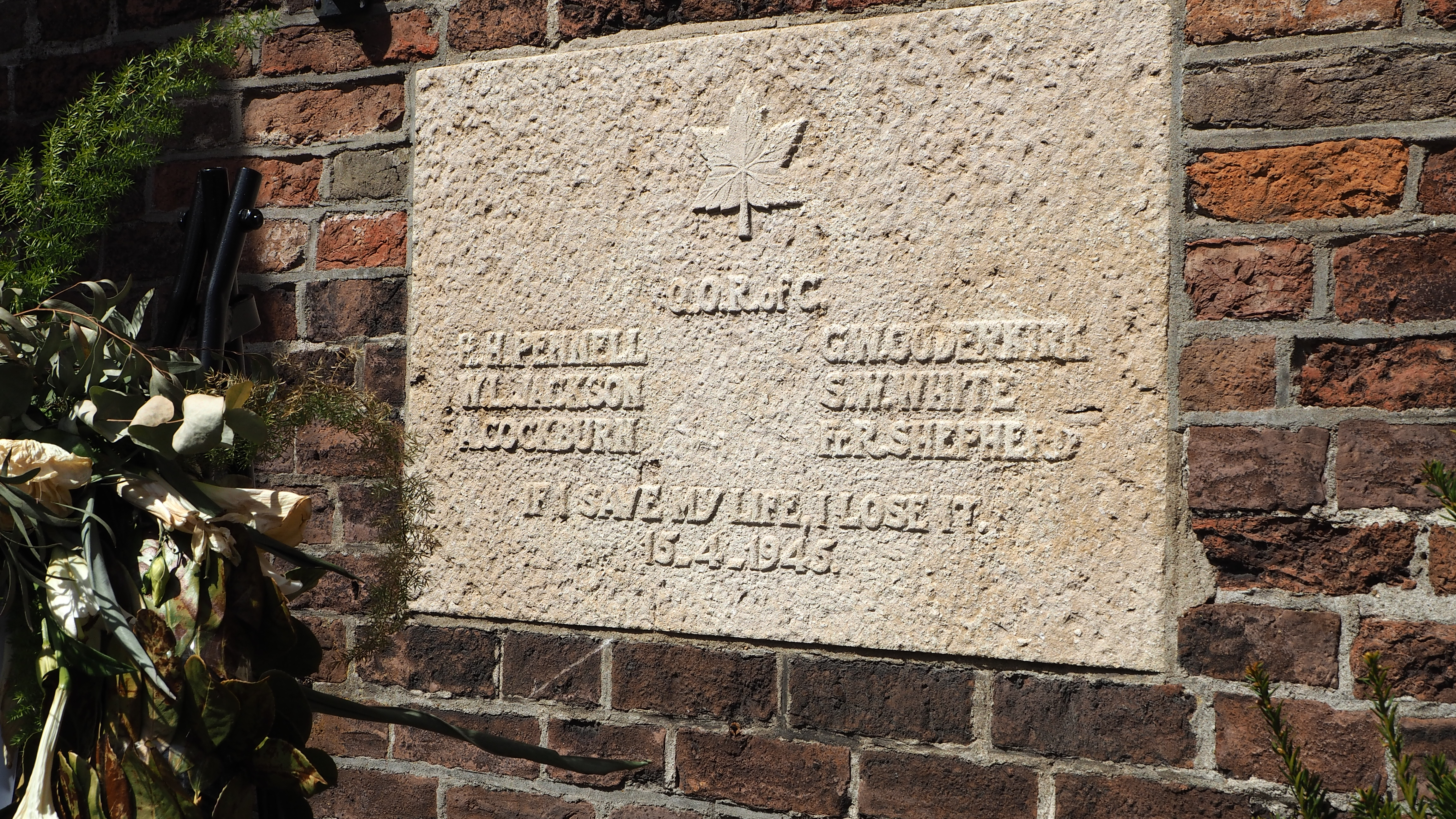 Gedenksteen voor Gesneuvelde Canadezen, Sneek